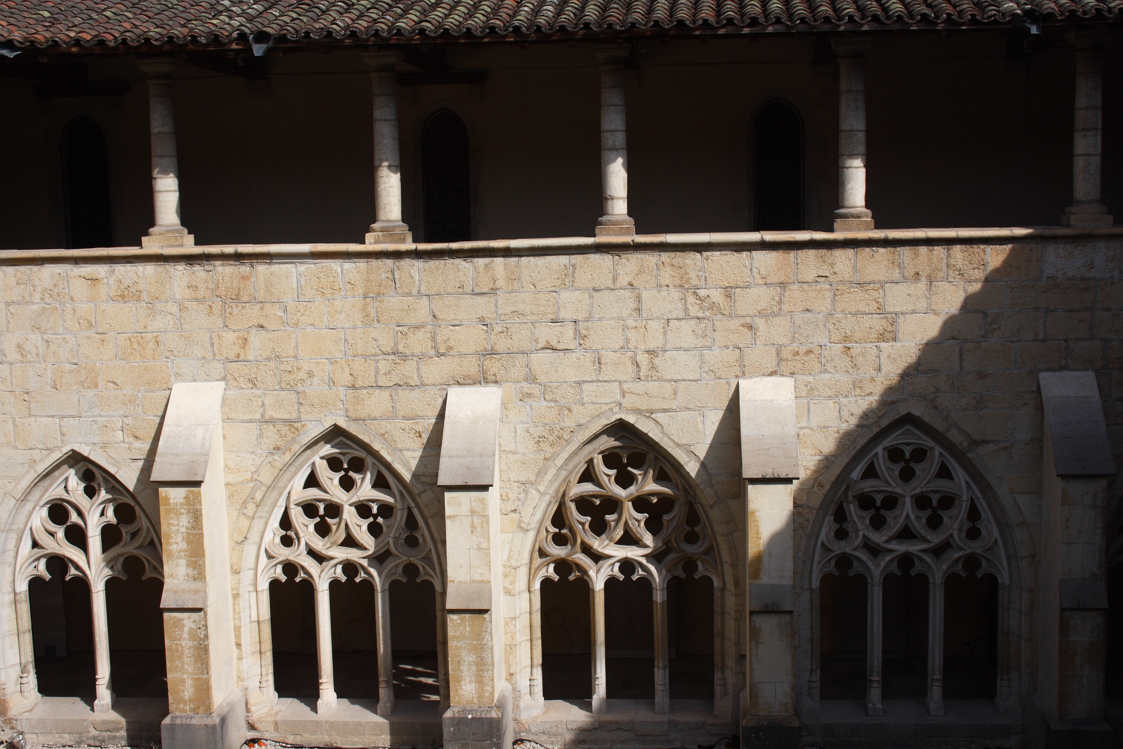 Ehemalige Benediktinerabtei Notre-Dame in Ambronay, einer Gemeinde im Département Ain in der französischen Region Rhône-Alpes, Kreuzgang